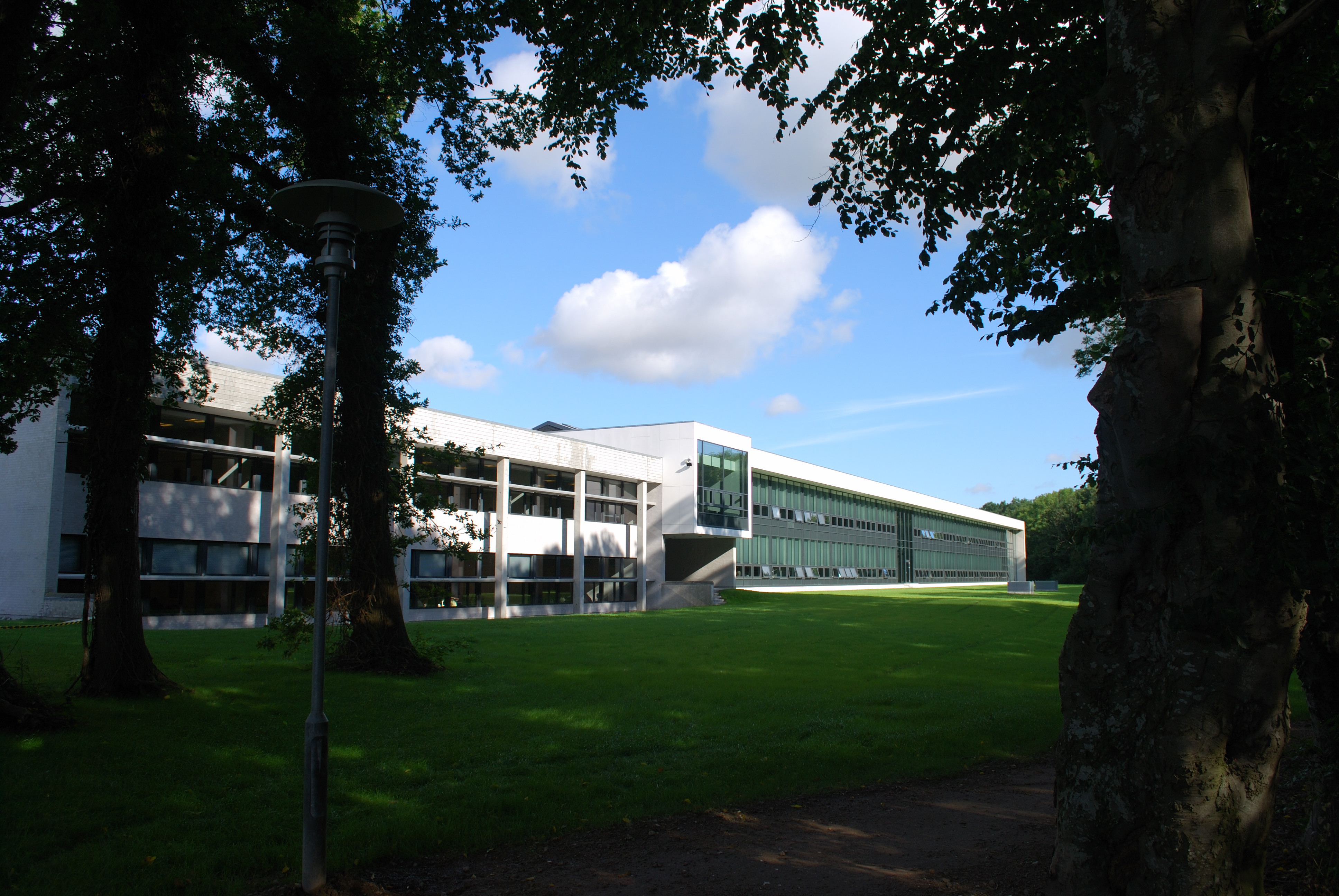 IBC Fredericia-Middelfart